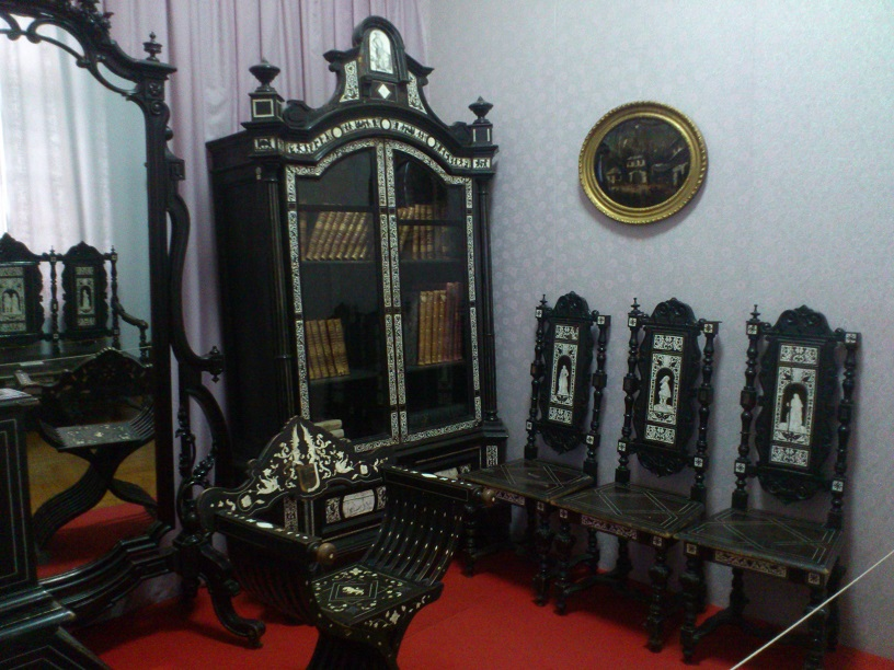 Мебельный гарнитур из экспозиции Ессентукского историко-краеведческого музея